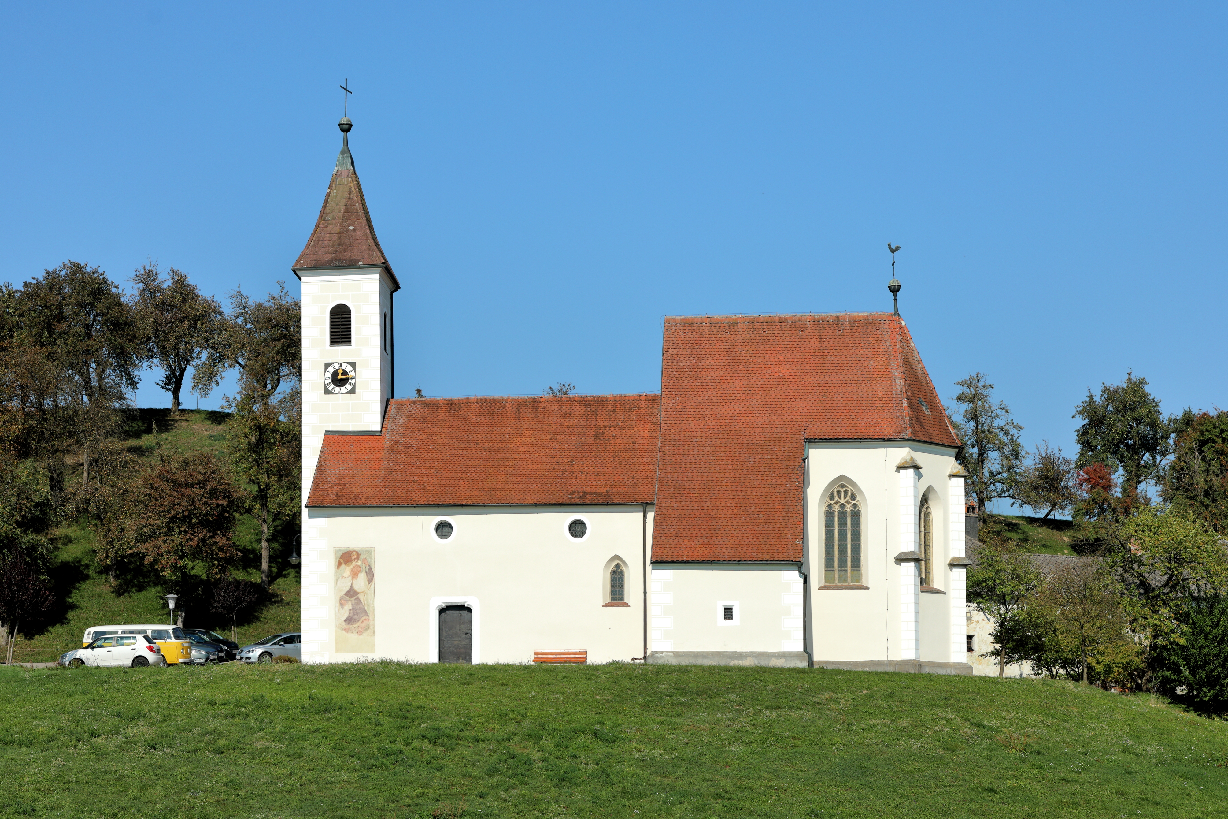 Südansicht der röm.-kath. Filialkirche hl. Agatha in Eisenreichdornach, ein Ortsteil der niederösterreichischen Stadtgemeinde Amstetten. Eine frühgotische Saalkirche (Kern aus dem 12./13. Jahrhundert) mit einem spätgotischen Chor und halb eingestellten Westturm.